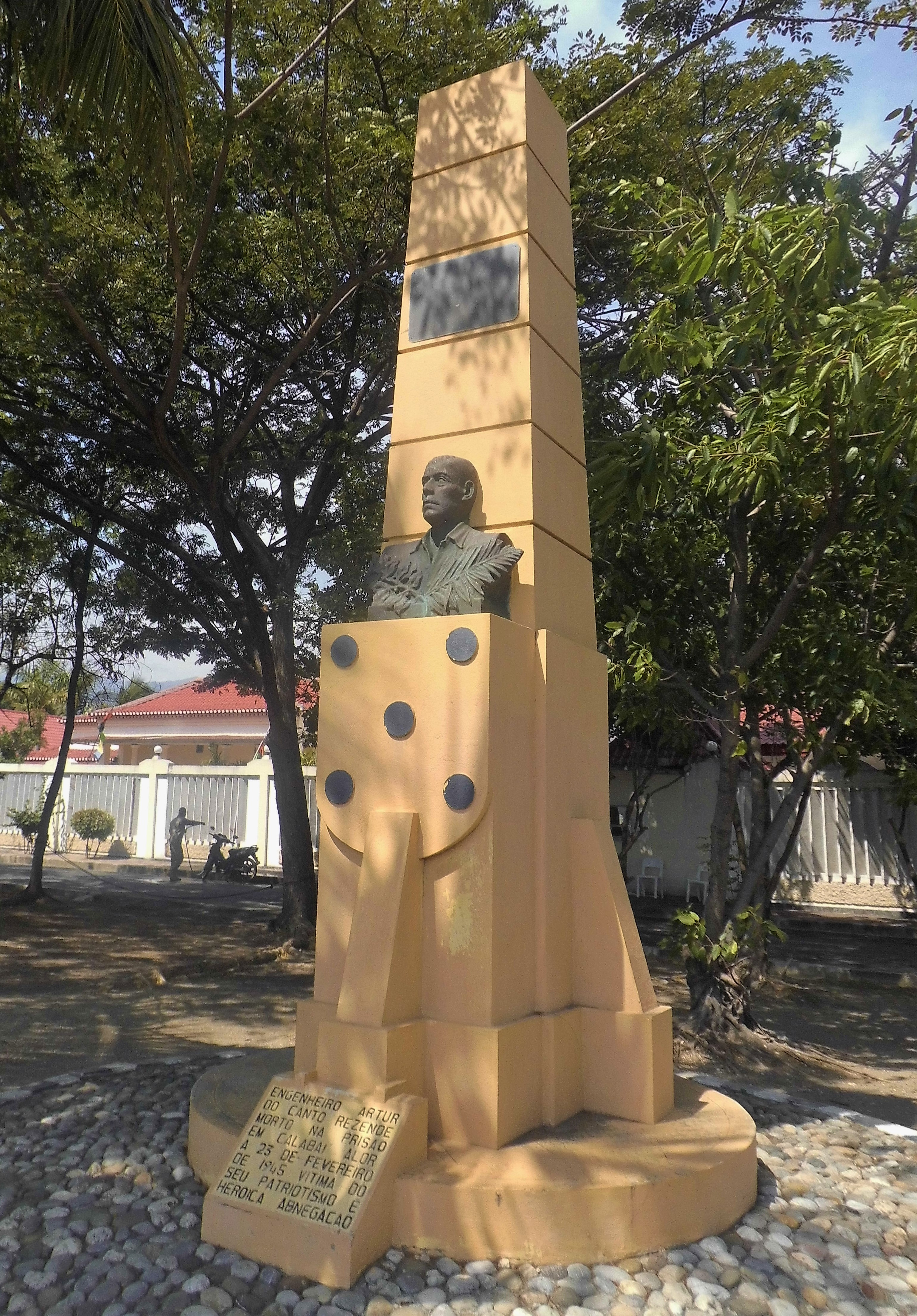 Denkmal für Engenheiro do Canto Rezende